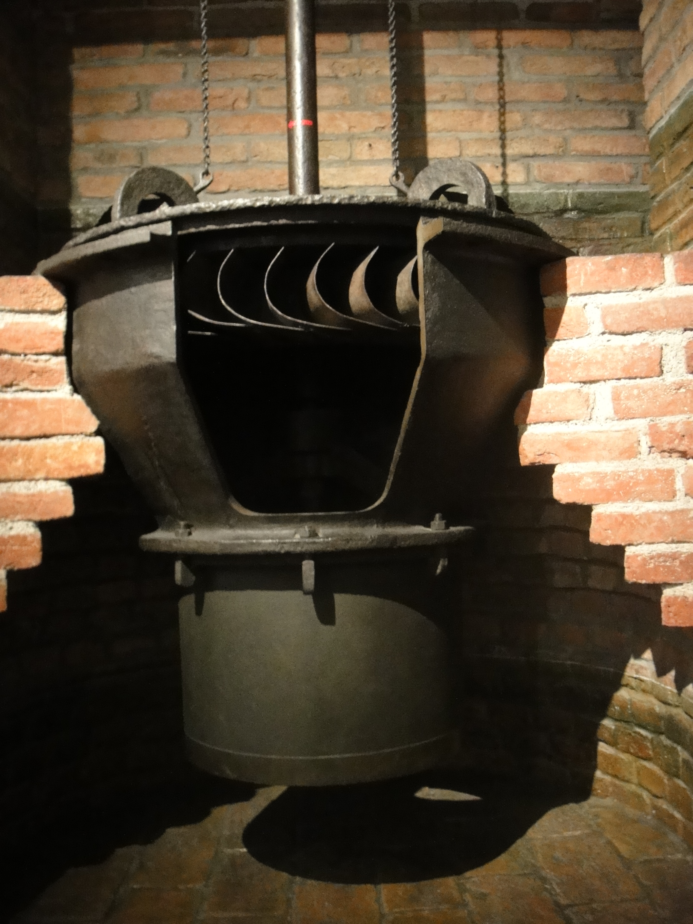 Henschel-Jonval-Turbine von 1840 Überdruckturbine, Bauart "Henschel", Henschel und Sohn, Kassel, 1840 Entworfen 1837 von Carl Anton Henschel für eine Sternschleiferei in Holzminden.